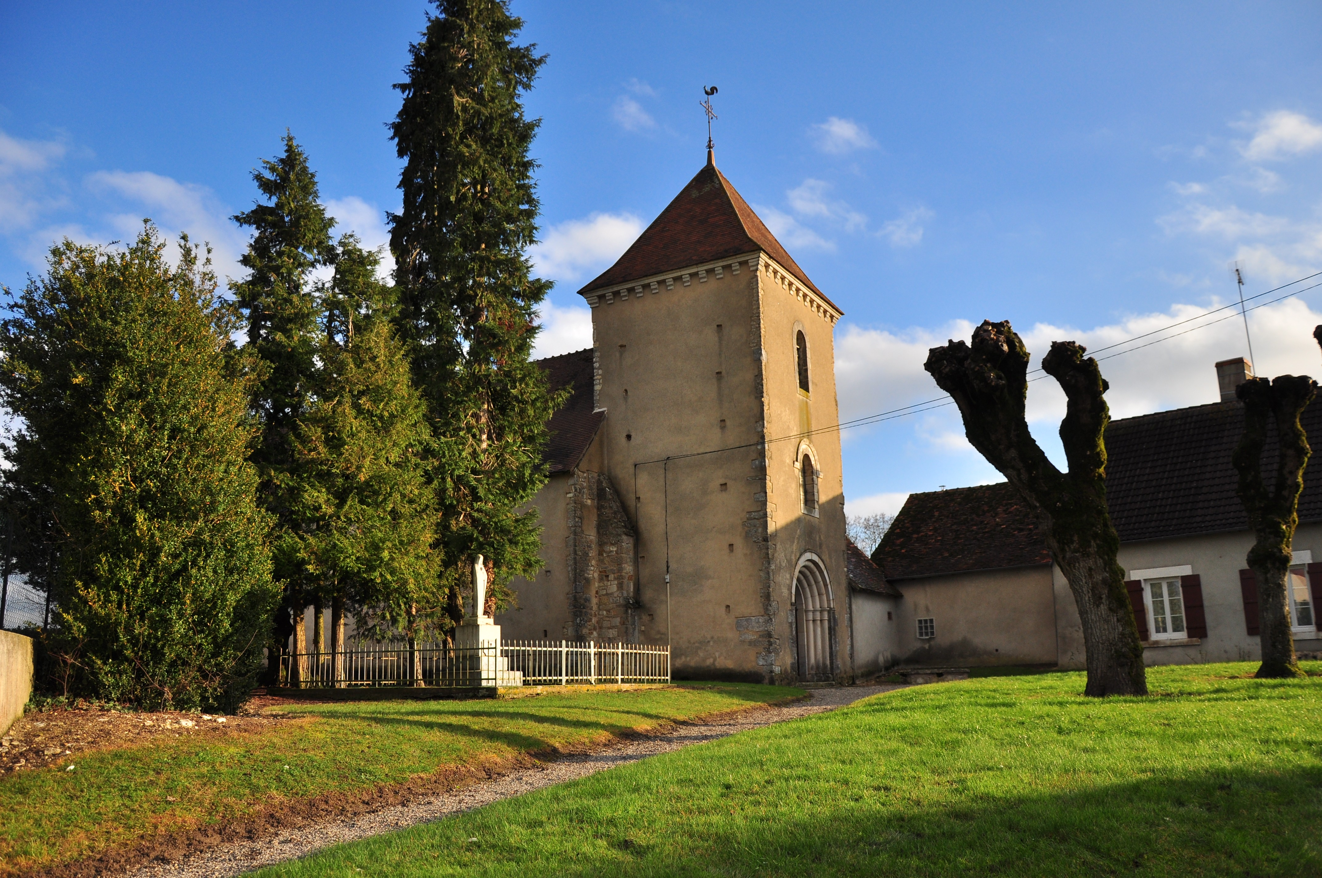 La Chapelle-Orthemale (Indre) - Eglise